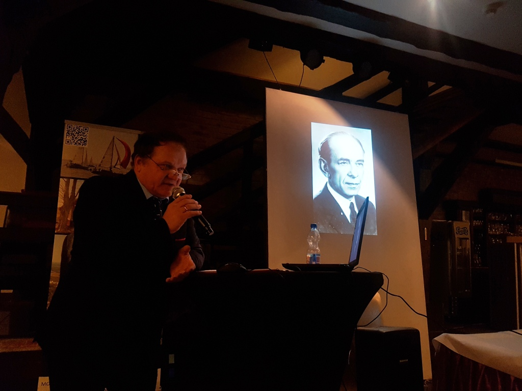 Towarzystwo Miłośników Braniewa, wykład w spichlerzu, 2018, 40-lecie TMB